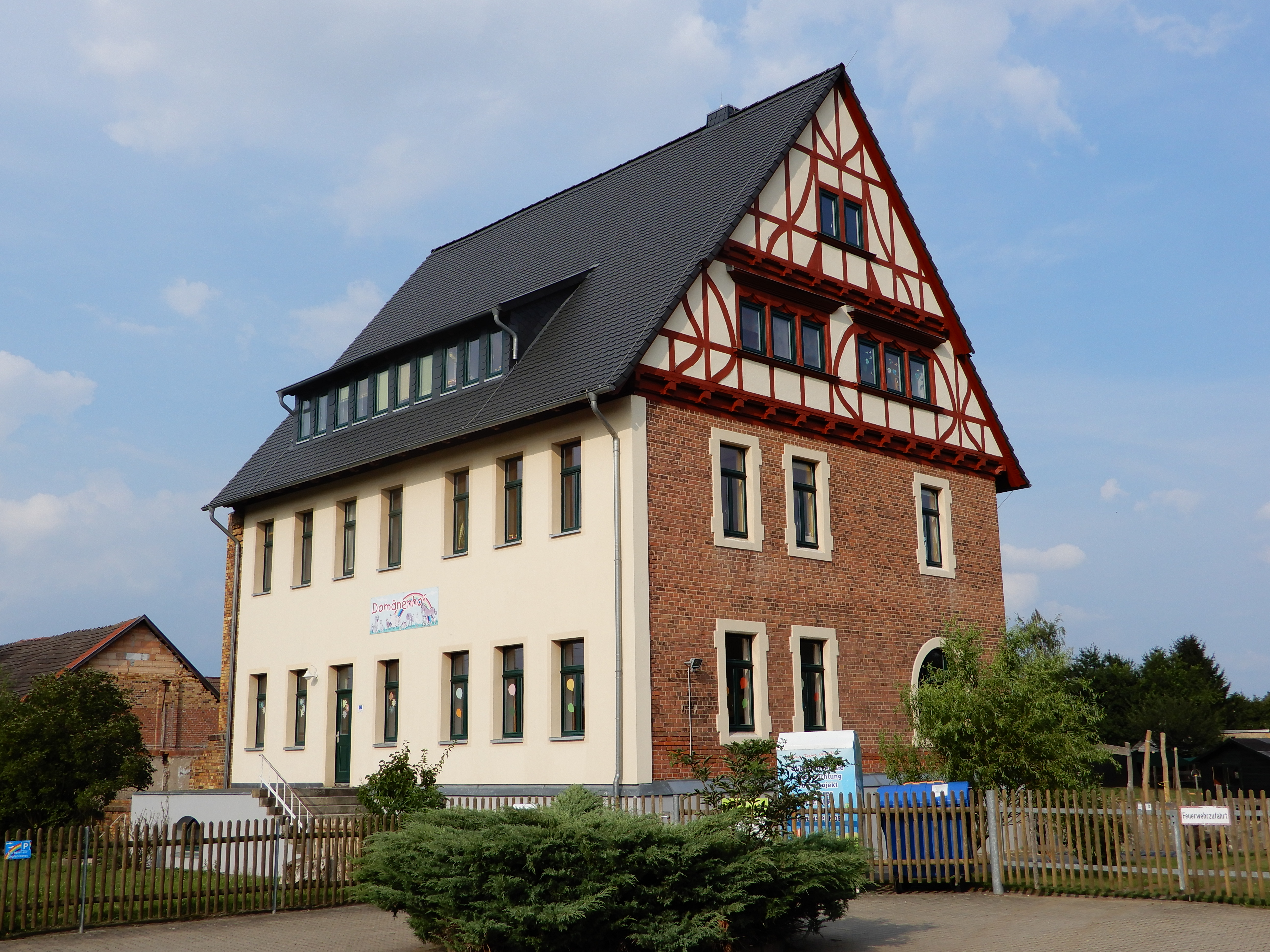 Domäne Lange Straße 87 (Radisleben)